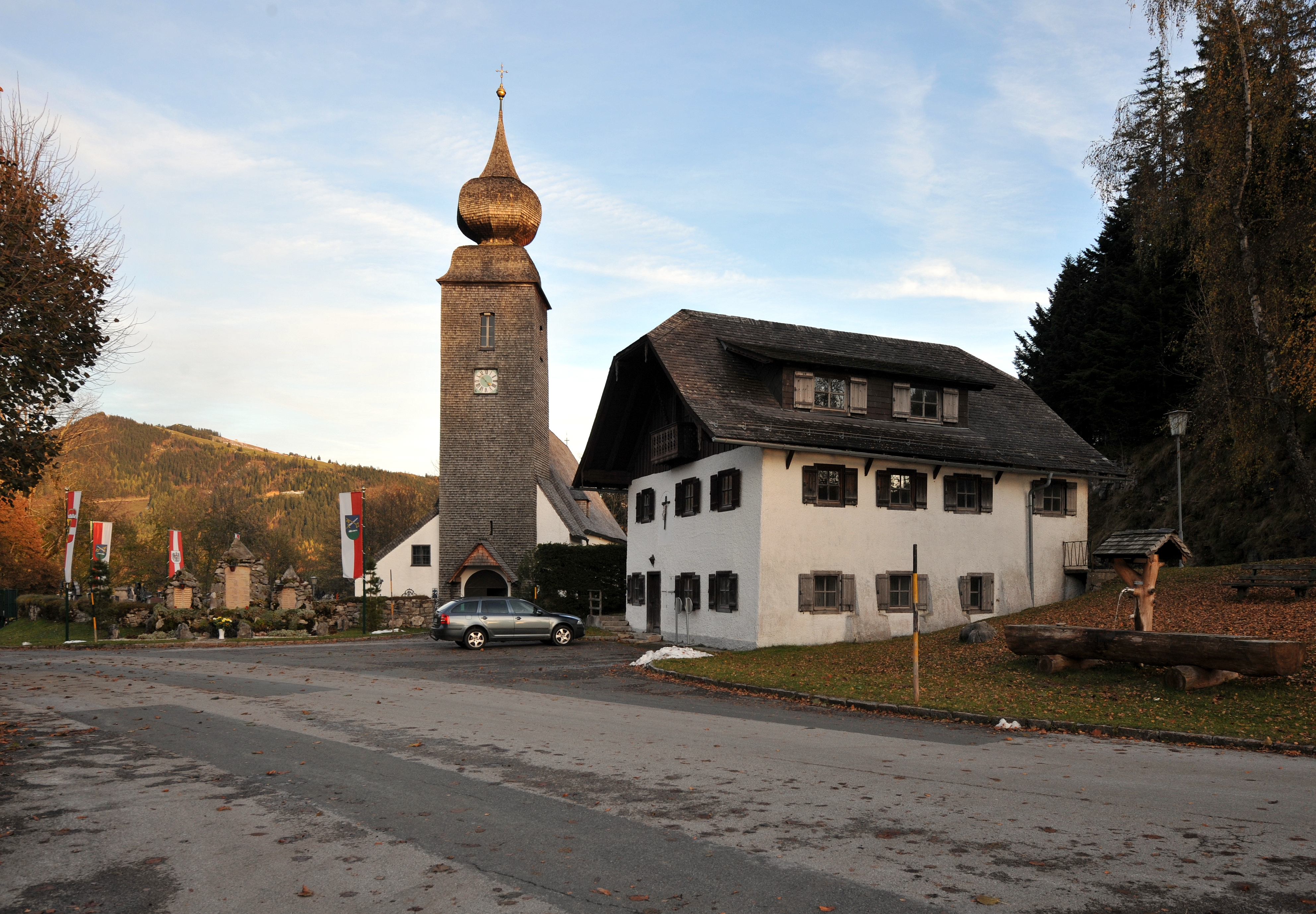 Kath. Pfarrkirche hl. Petrus und Paulus